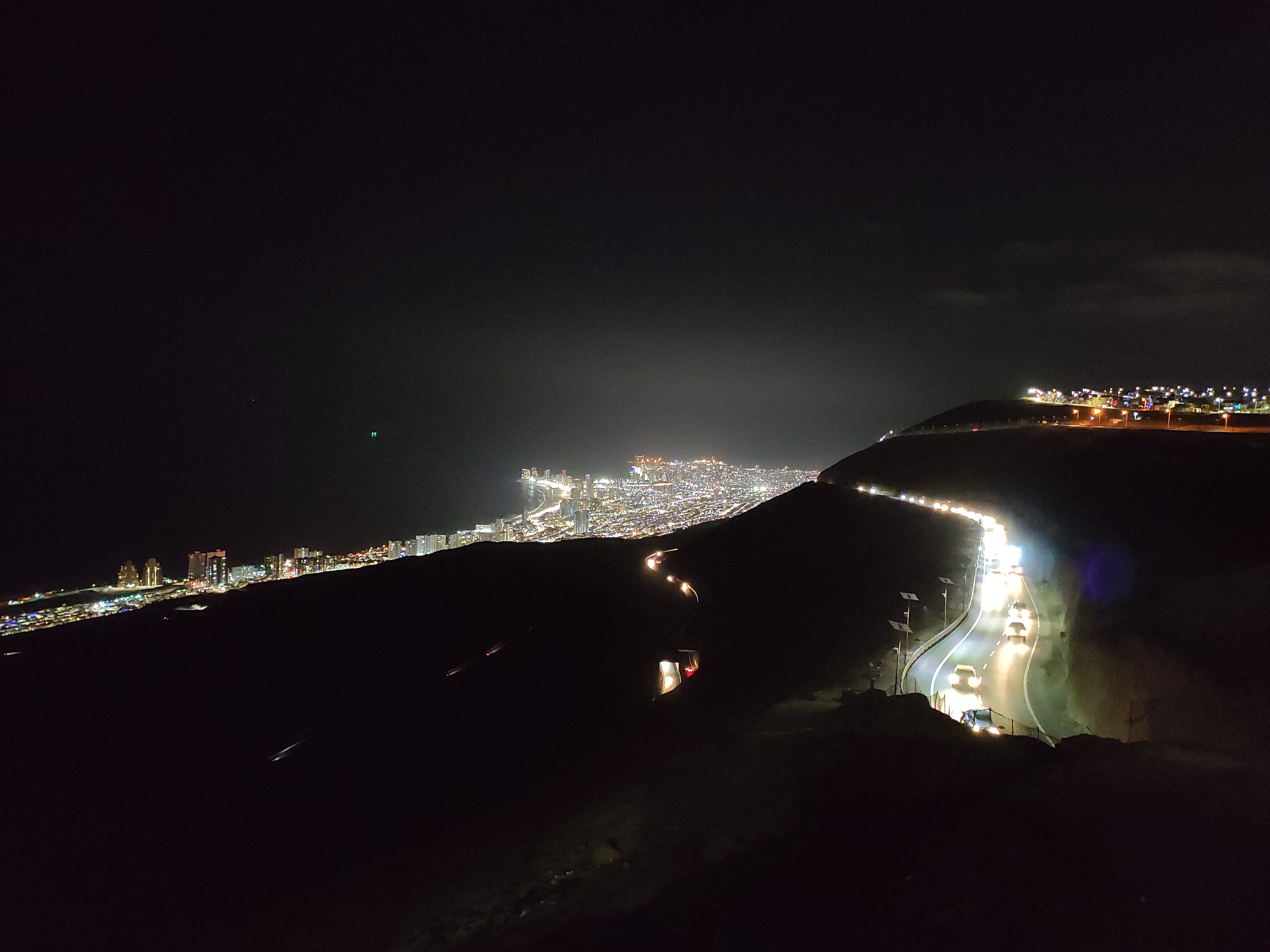 Vista nocturna de Iquique desde mirador en Alto Hospicio, a aproximadamente 500 metros de altura.